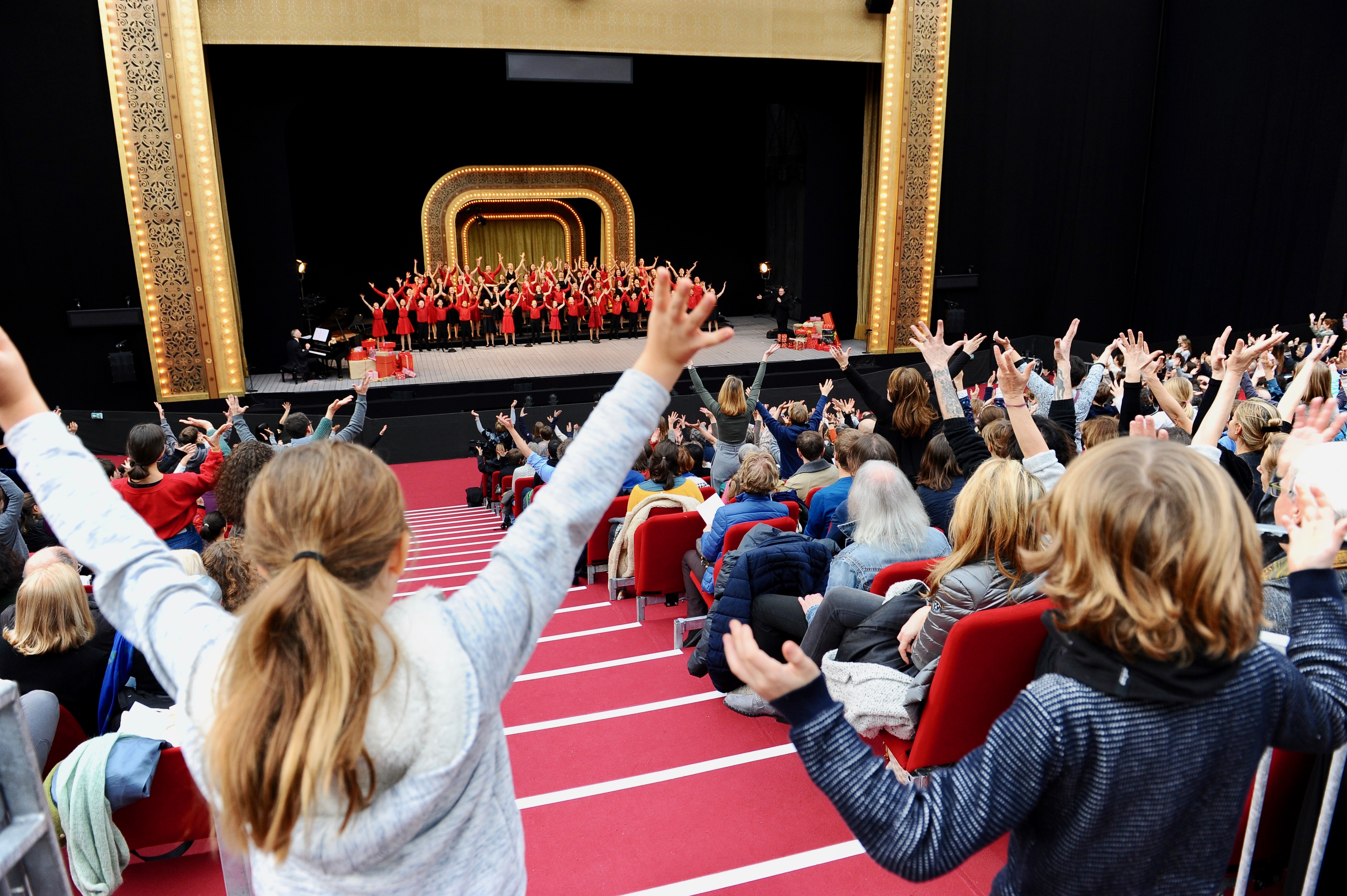 Chœur d'Enfants Sotto Voce. Direction Artistique, Scott Alan Prouty. "Concert de Noël, Grand Palais